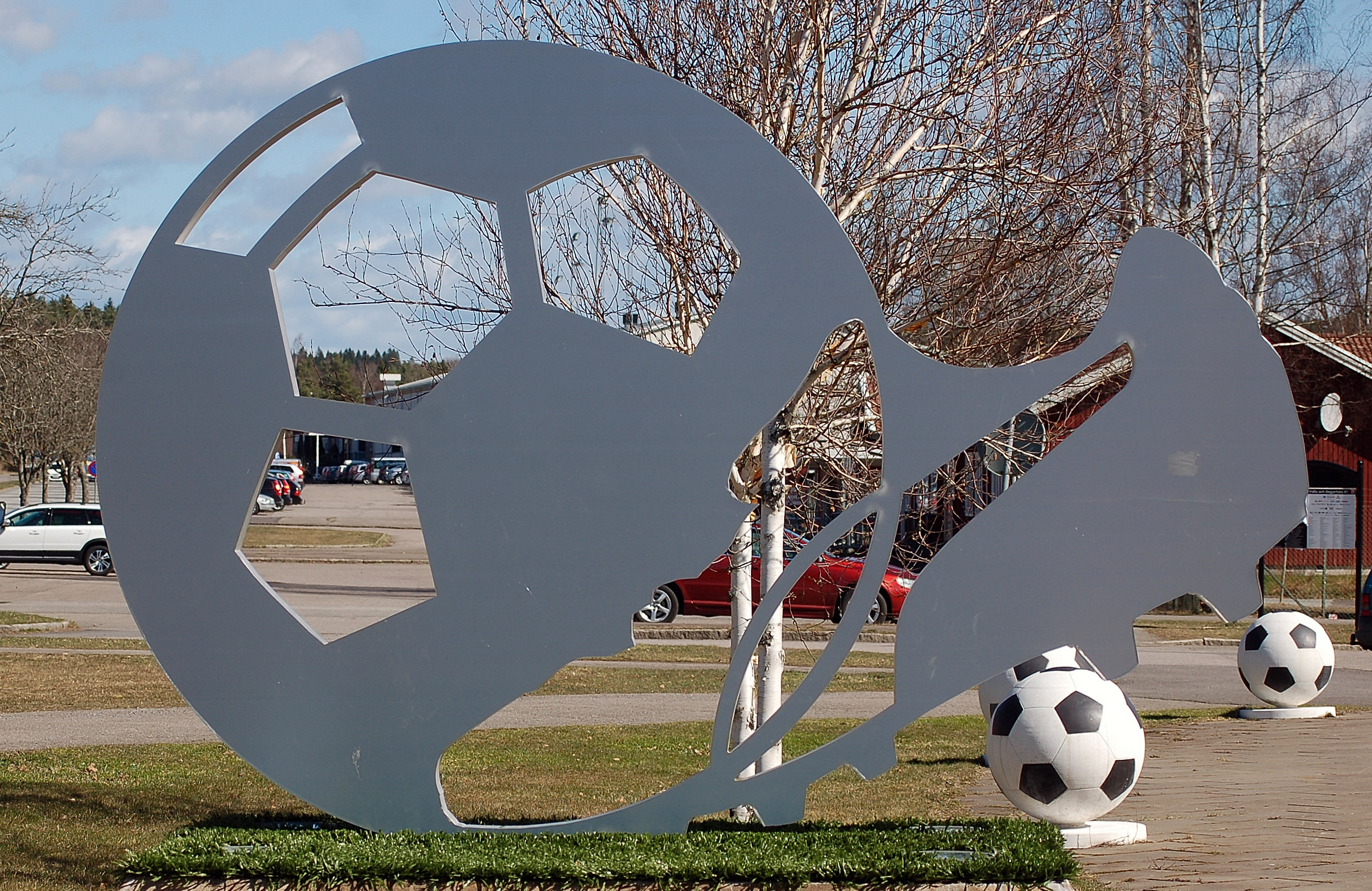 "Avspark" av Karlskogakonstnären Göran Persson, skulpturen är placerad utanför Fotbollens hus i Degerfors.